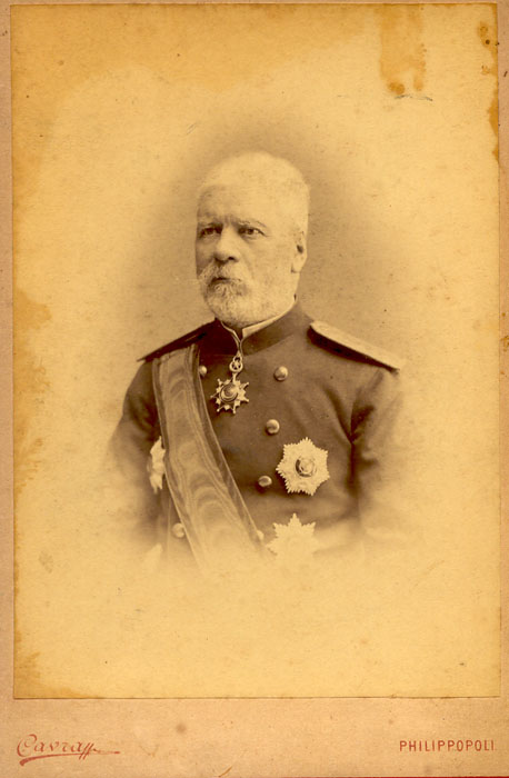 Вторият генерал-губернатор на Източна Румелия, Гаврил Кръстевич.